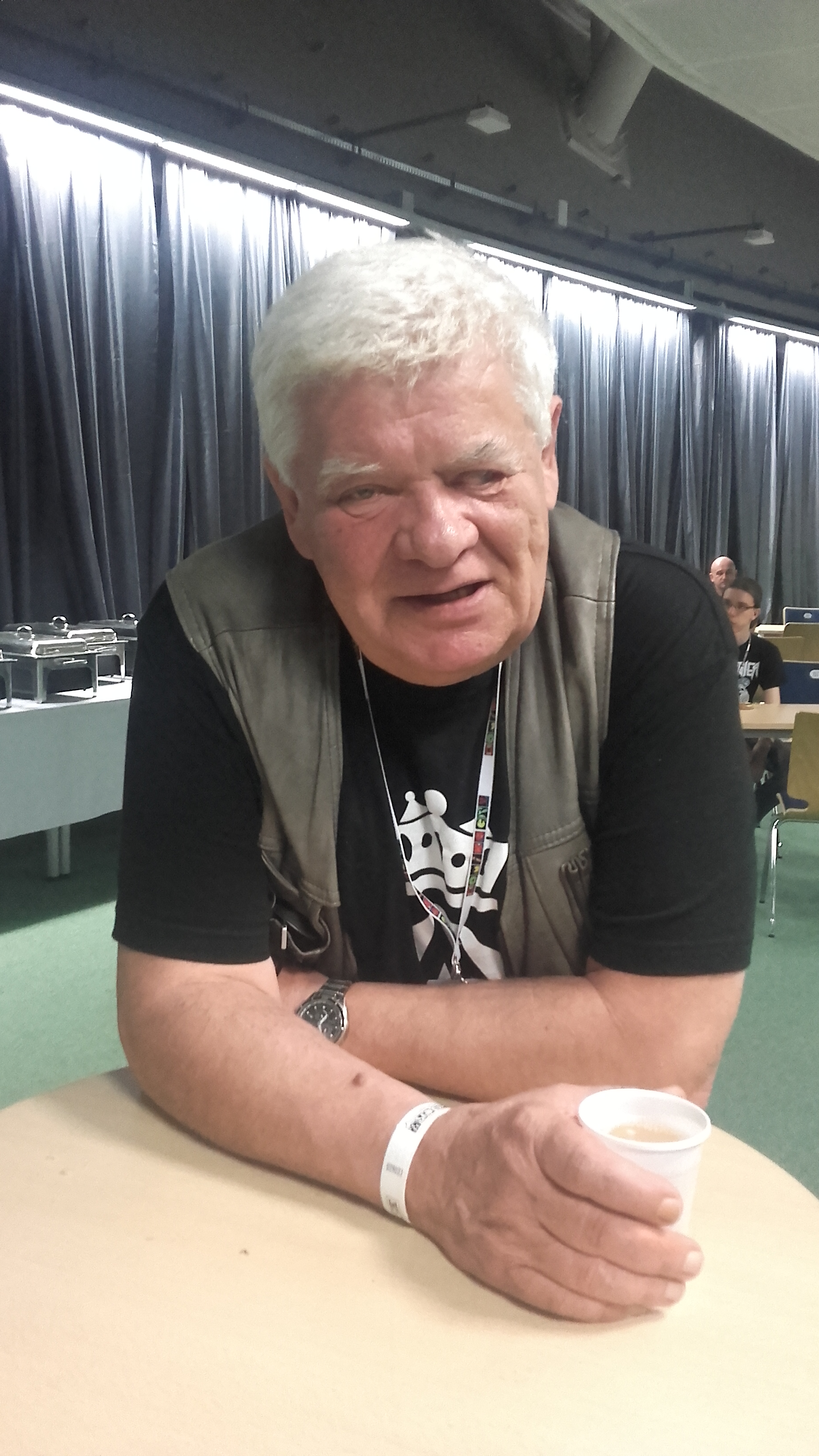 Tomasz Knapik, polski lektor filmowy, radiowy i telewizyjny na 26. Międzynarodowym Festiwalu Komiksu i Gier w Łodzi